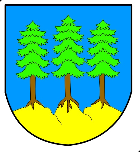 Wappen von Grächen